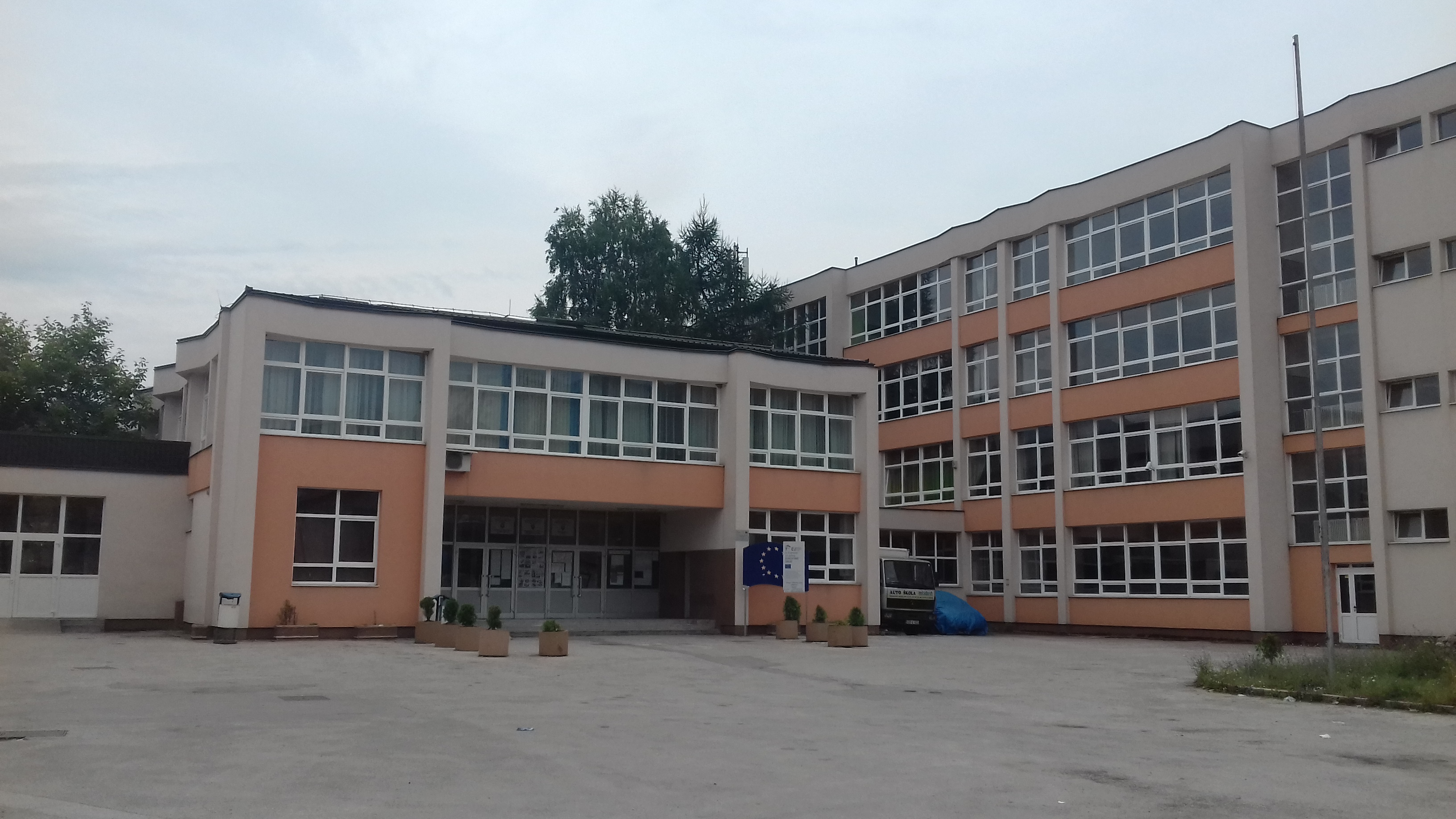 Техничка школа на Билмишту